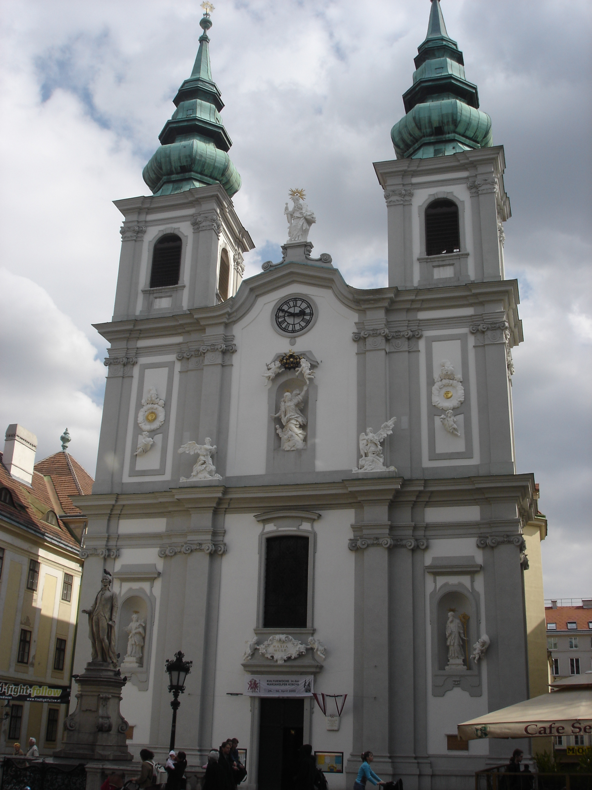 Mariahilfkirche, Vienna